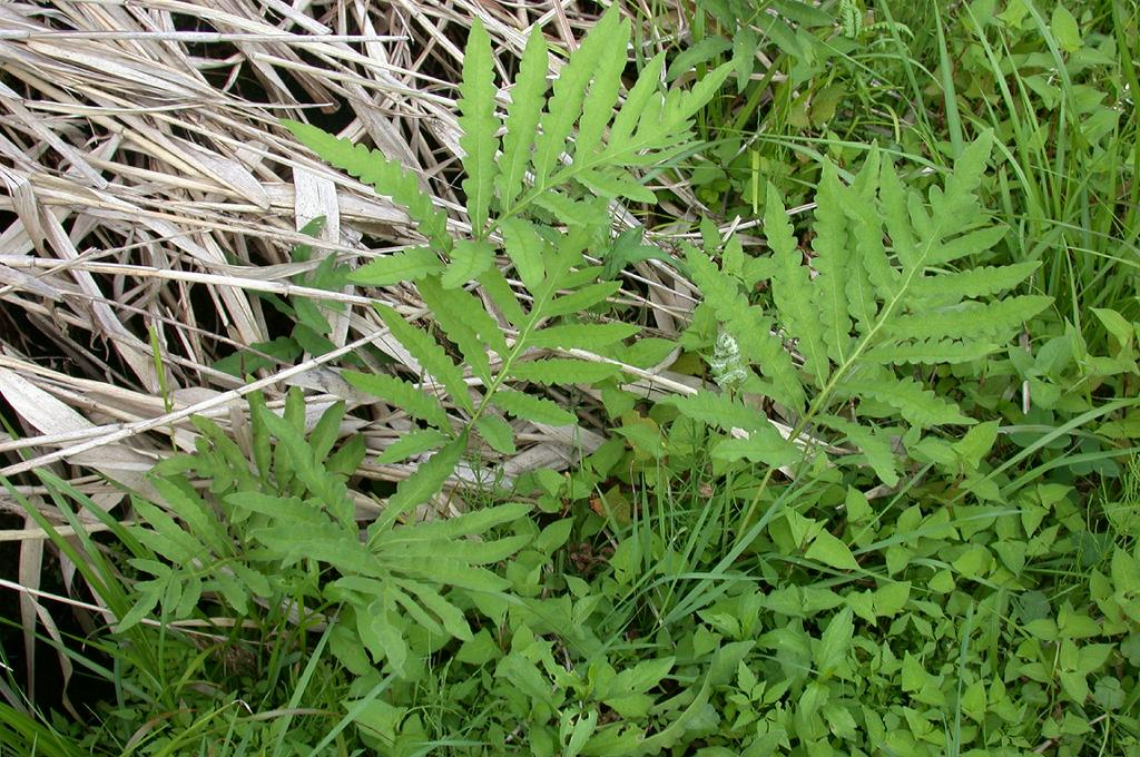 Onoclea sensibilis：コウヤワラビ 2003/06/15 新潟県：Niigata Pref. Japan.